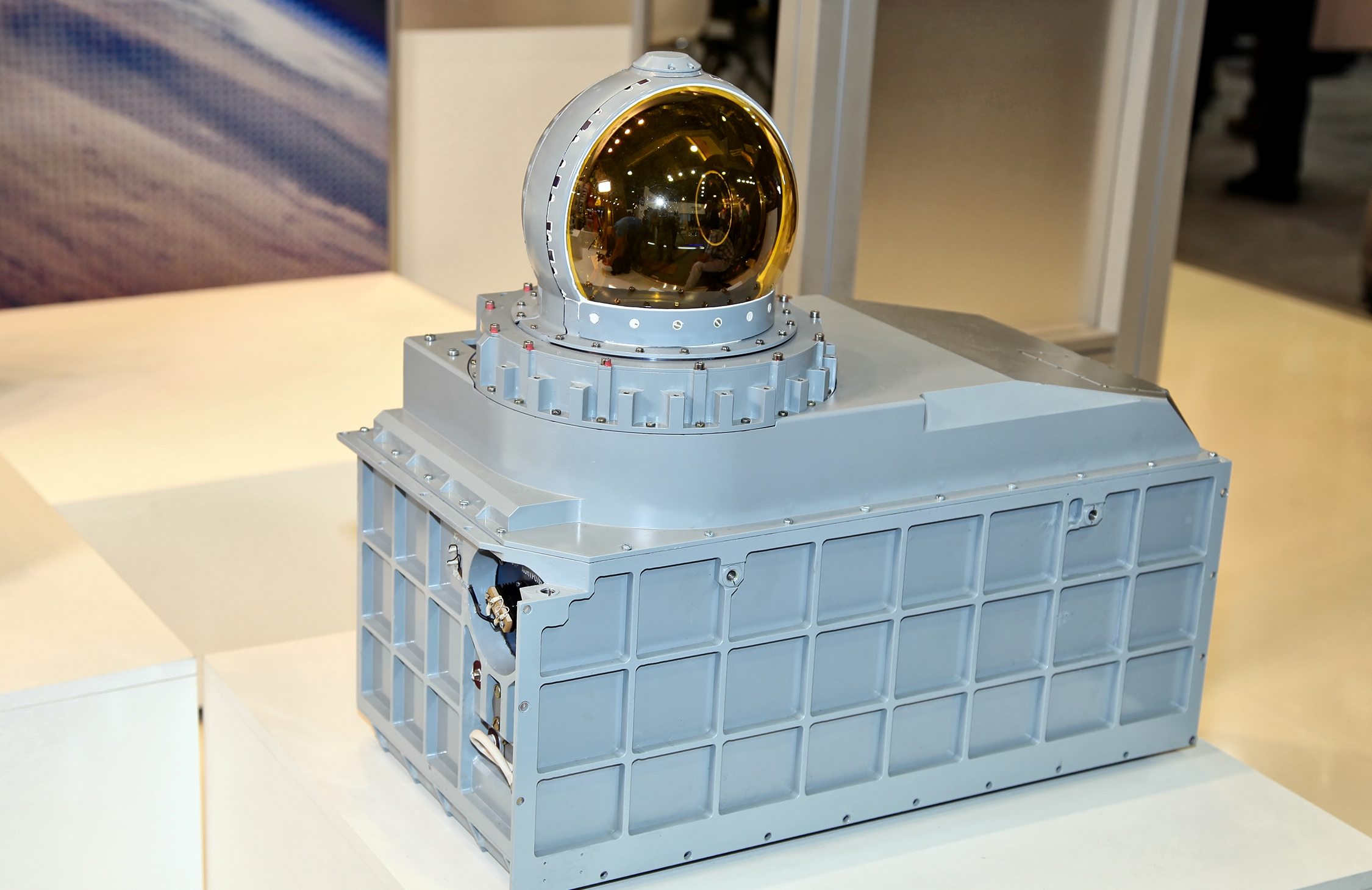 Оптико-локационная станция комплекса 101КС из состава БРЭО Т-50 (Optic-location station 101KS-V from 101KS system for T-50)